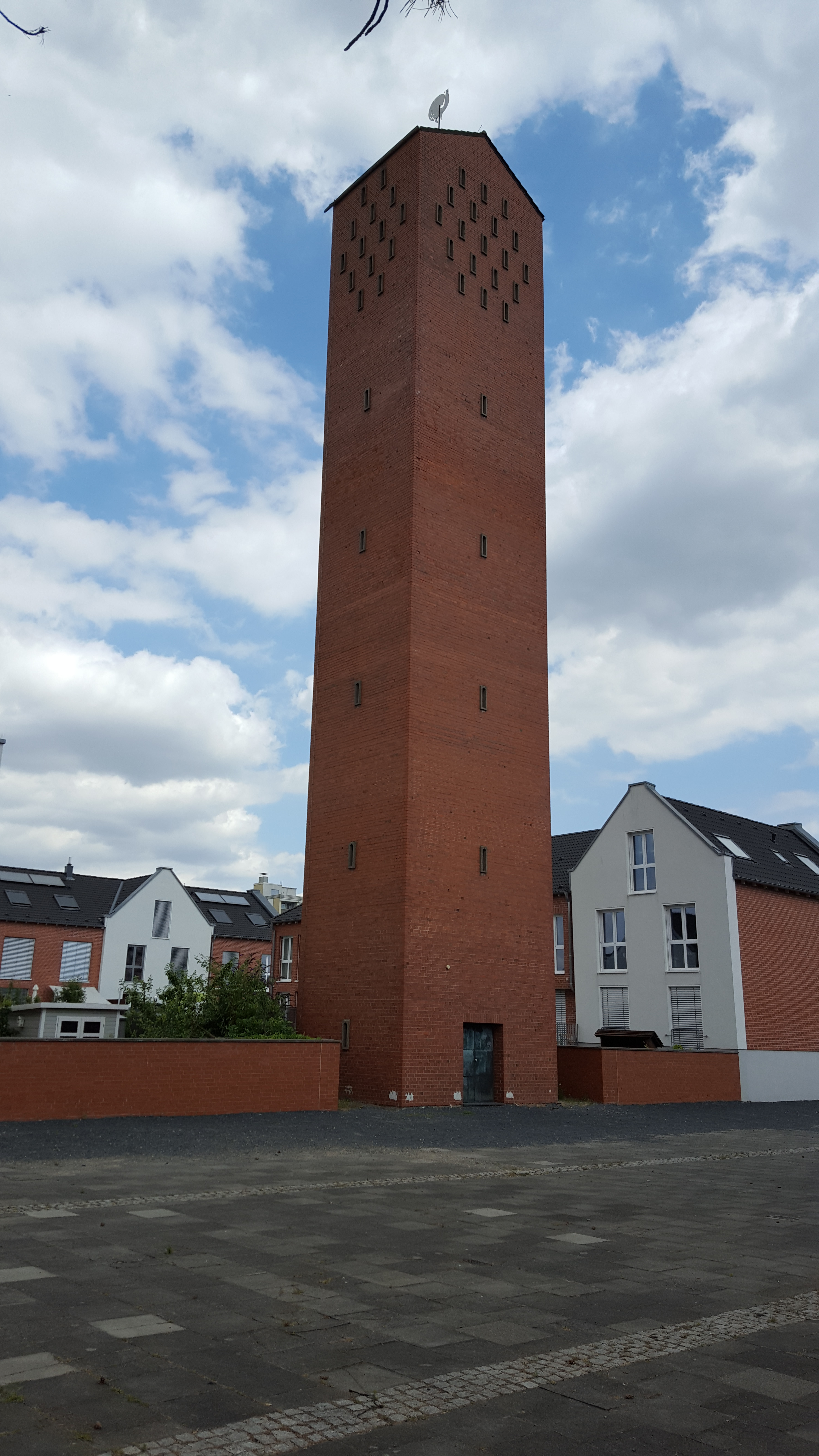 Bad Godesberg, Juli 2019